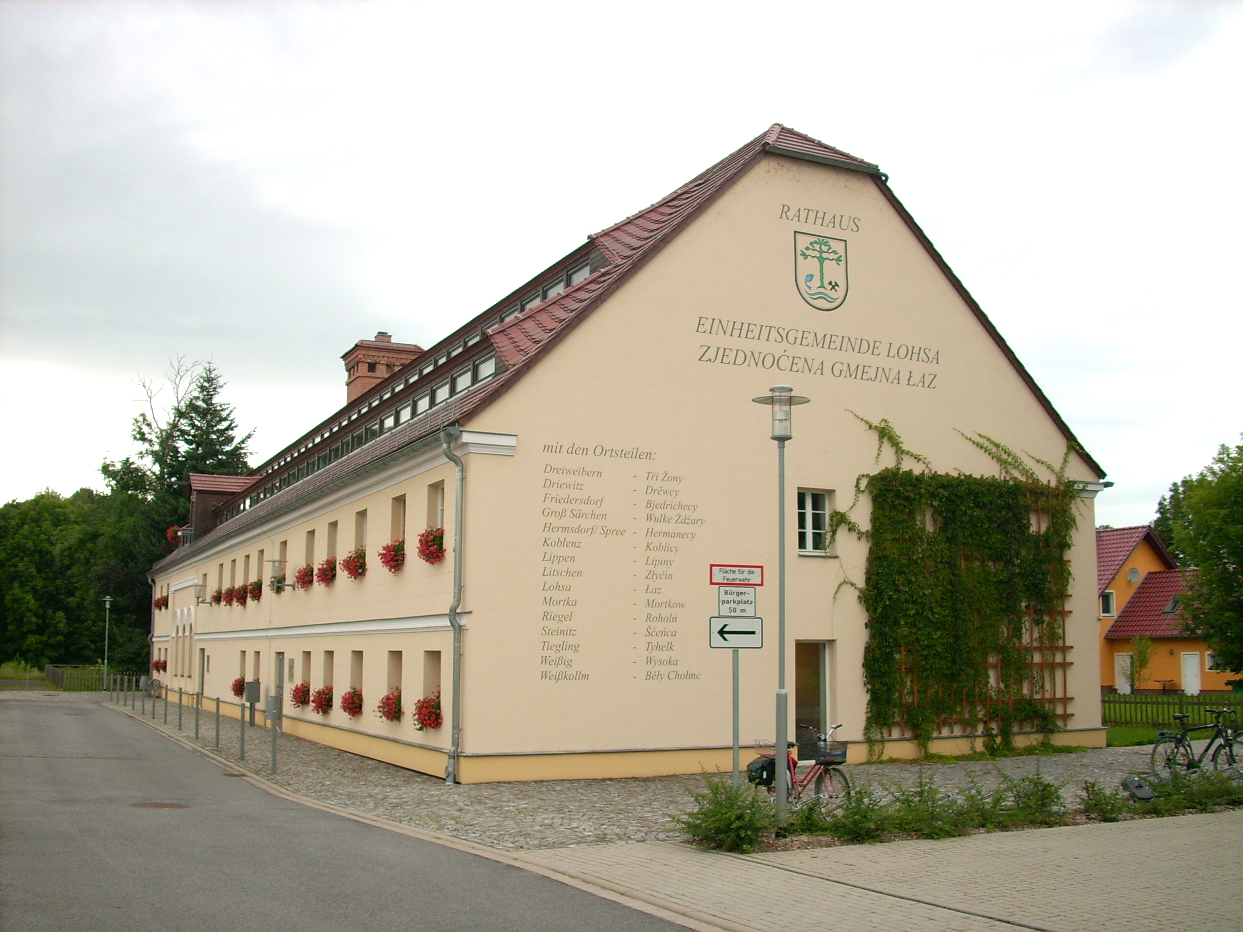 Rathaus von Lohsa